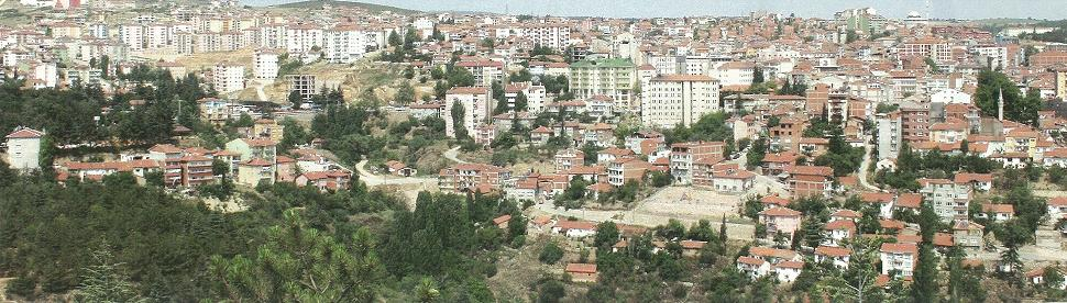 Bilecik Panaroma